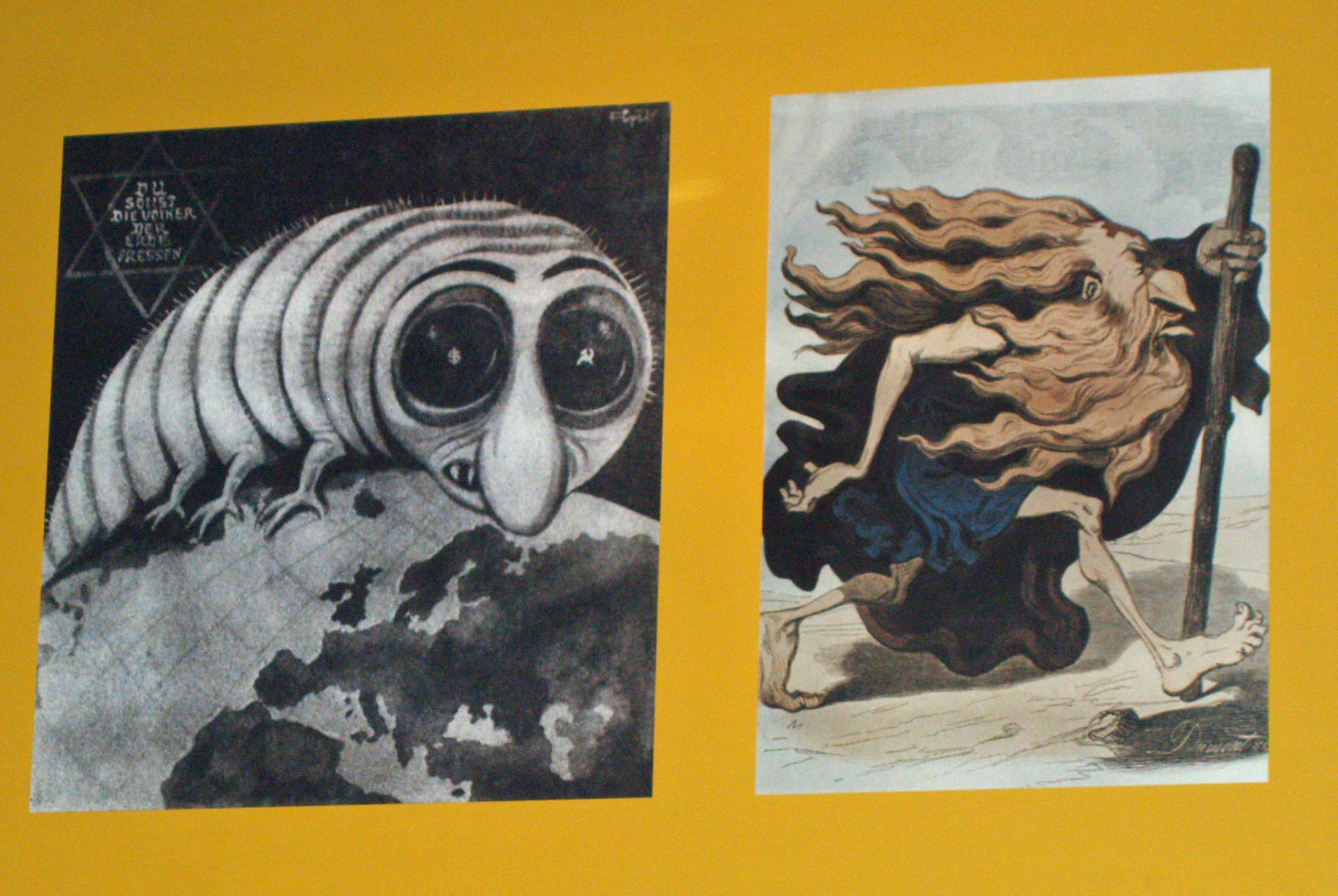 Nazi Anti-Semitic propaganda at Yad Vashem